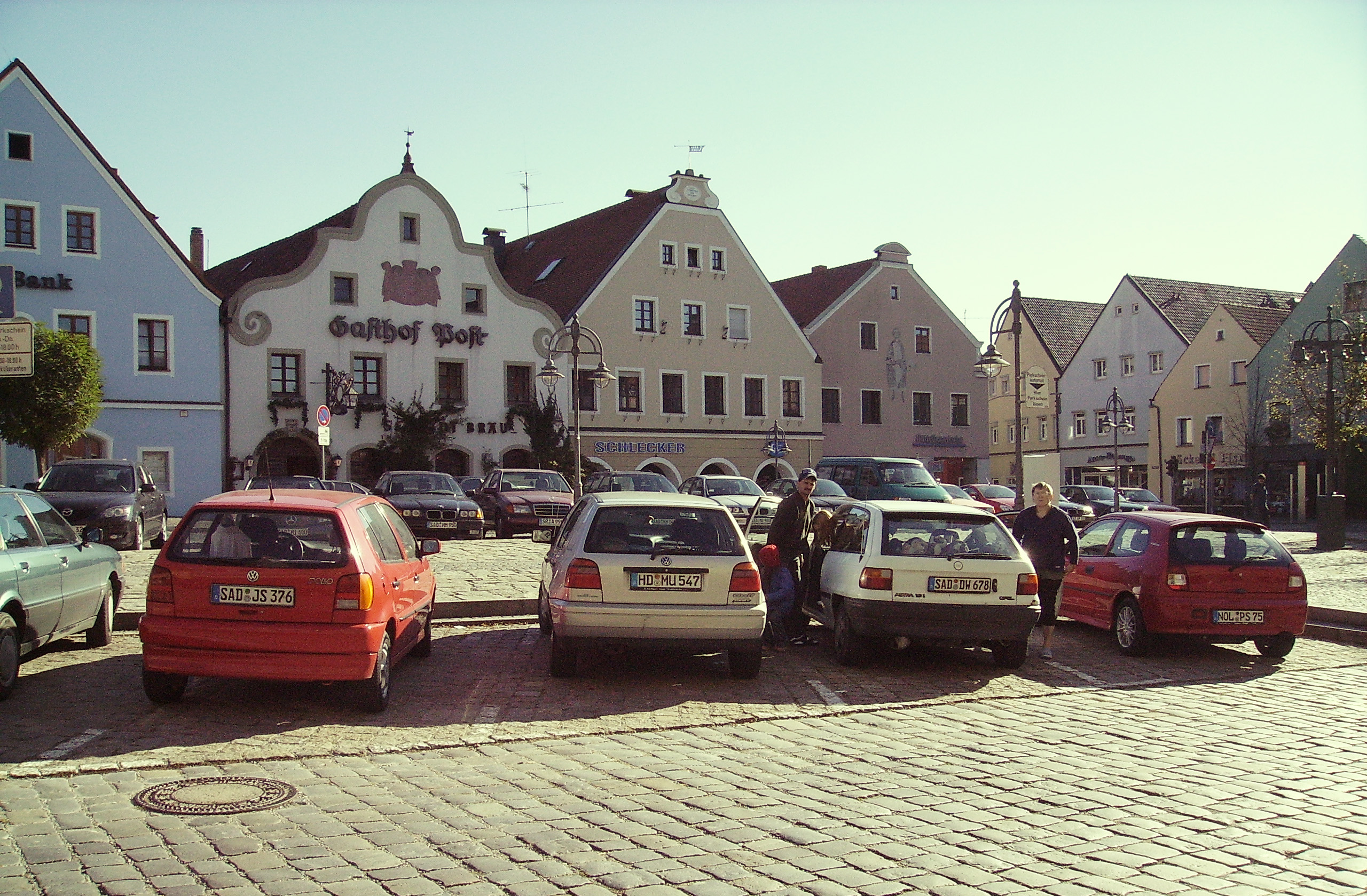 Beschreibung: Marktplatz in Schwandorf Quelle: Bild selbst erstellt Datum: 21. Dezember 2006 Autor: Midtown Manhattan